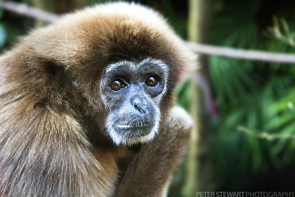 Tokyo Zoo